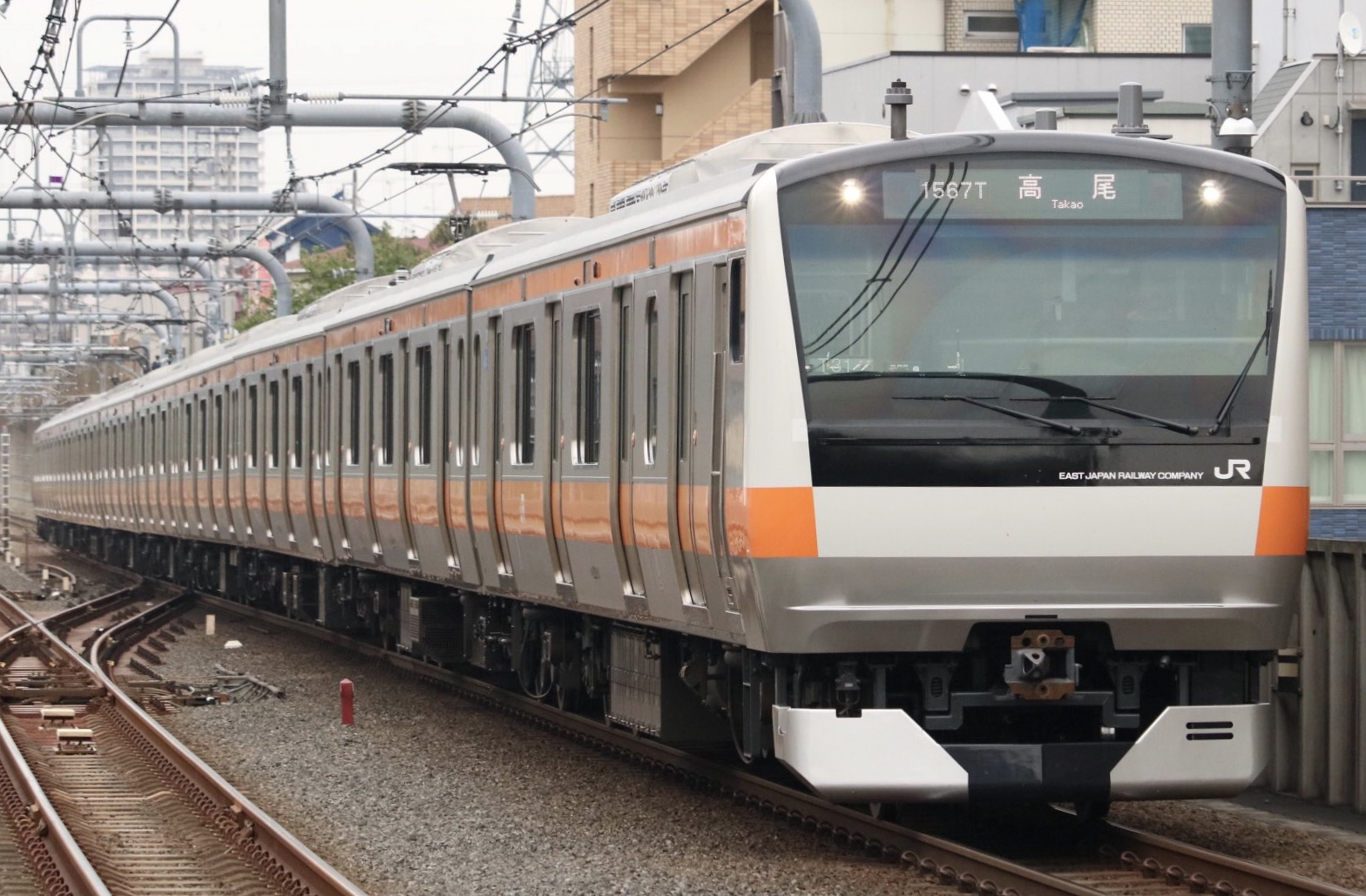 JR東日本E233系電車 各駅停車高尾